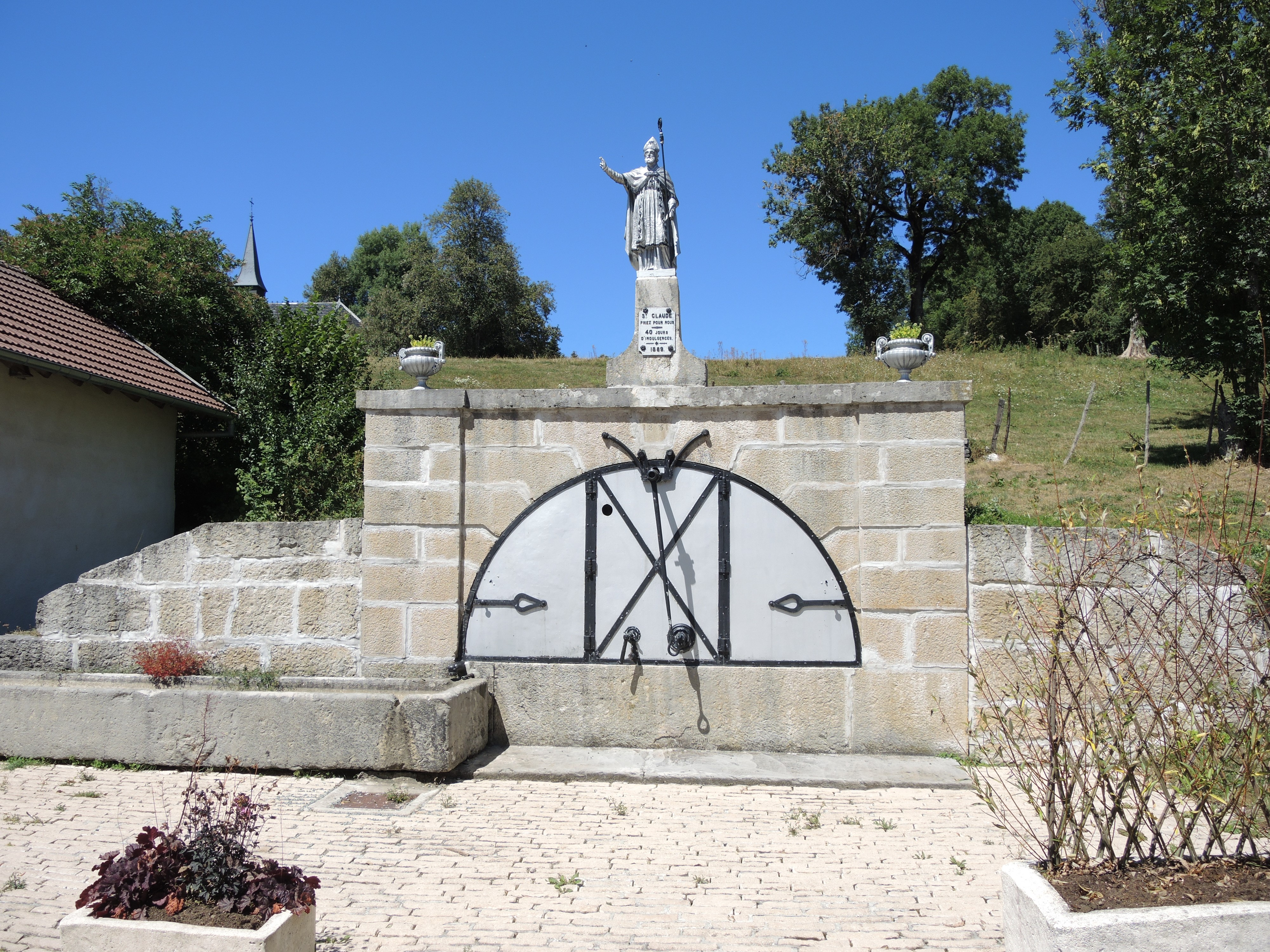 Ancienne fontaine-réservoir Saint-Claude. Les Fontenelles. Doubs